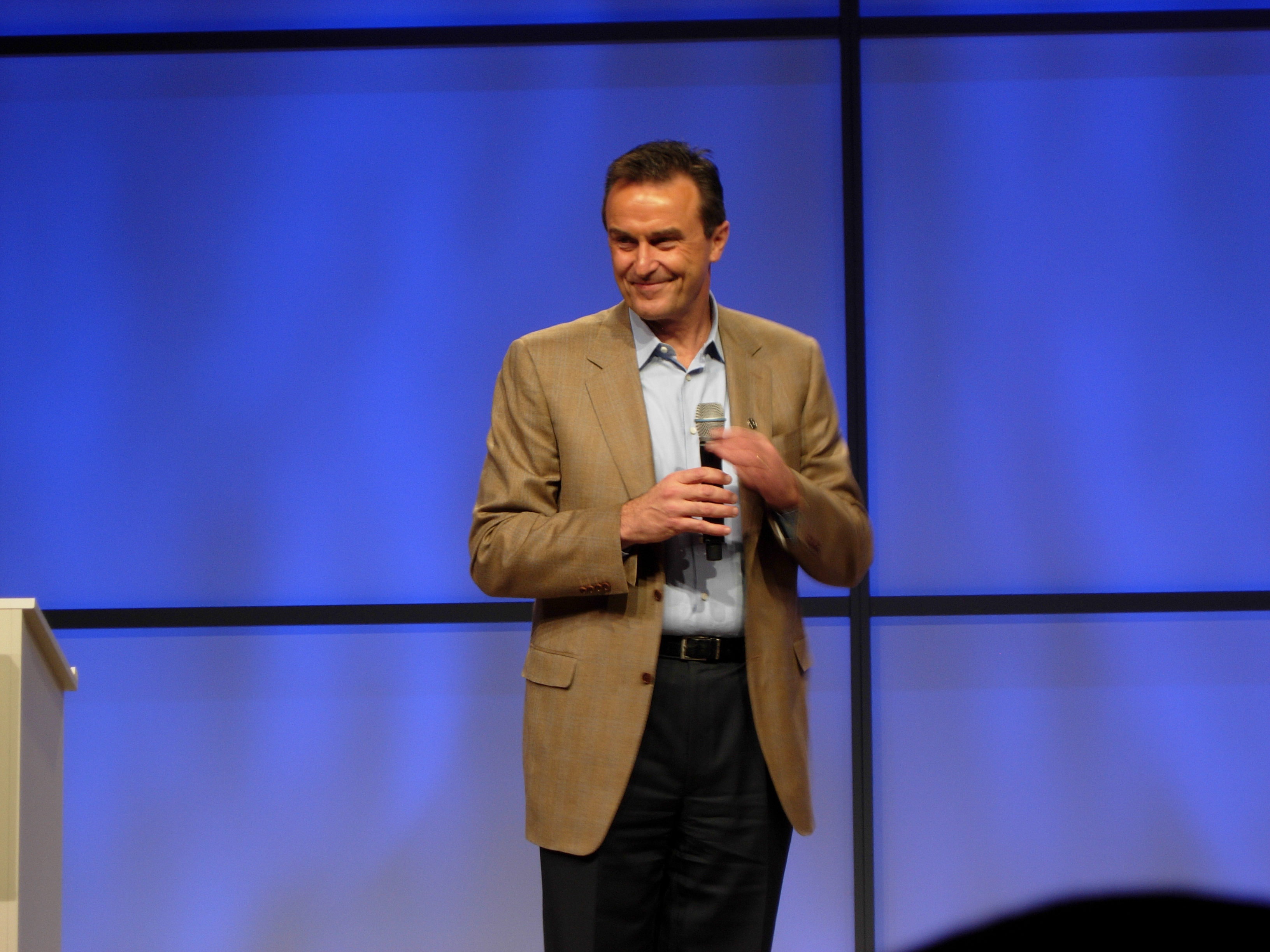 Mike Zafirovski at Las Vegas Conference